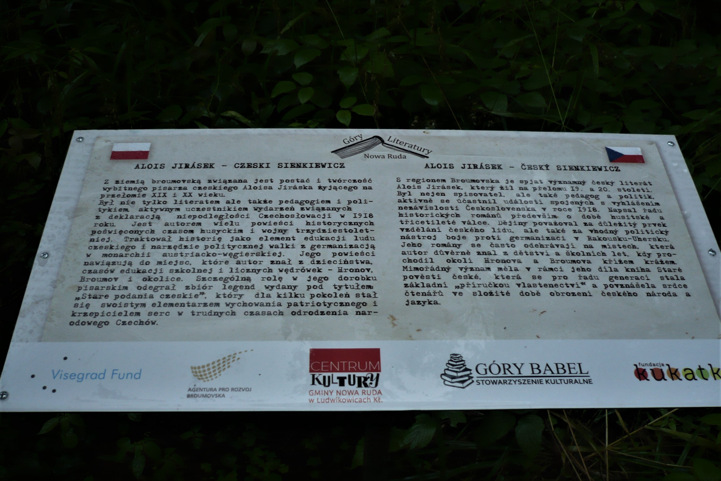 Tablica na Drodze Chlebowej Sonov - Włodowice